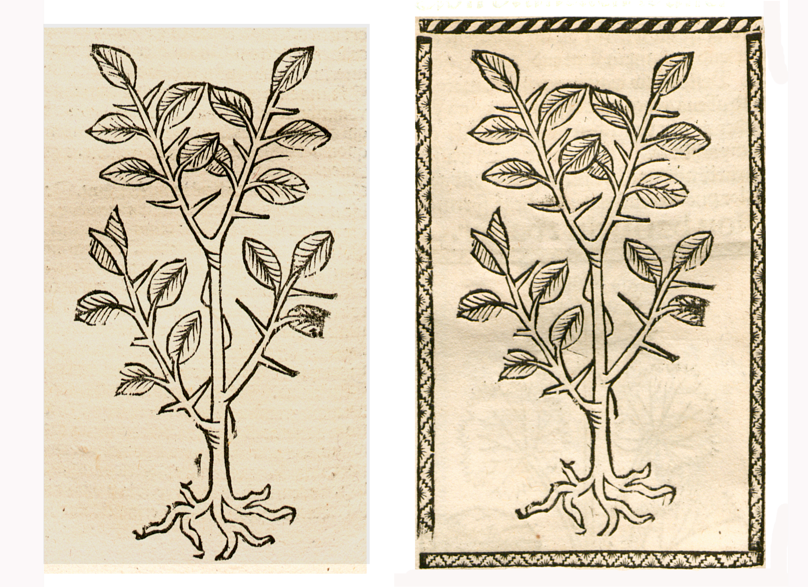 Abbildung von: Braunelle